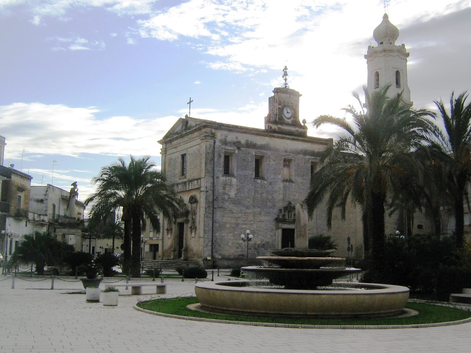 Cavallino Piazza Castromediano